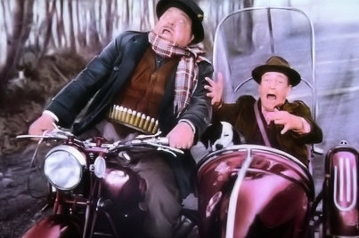 Totò nelle immagini dei suoi film